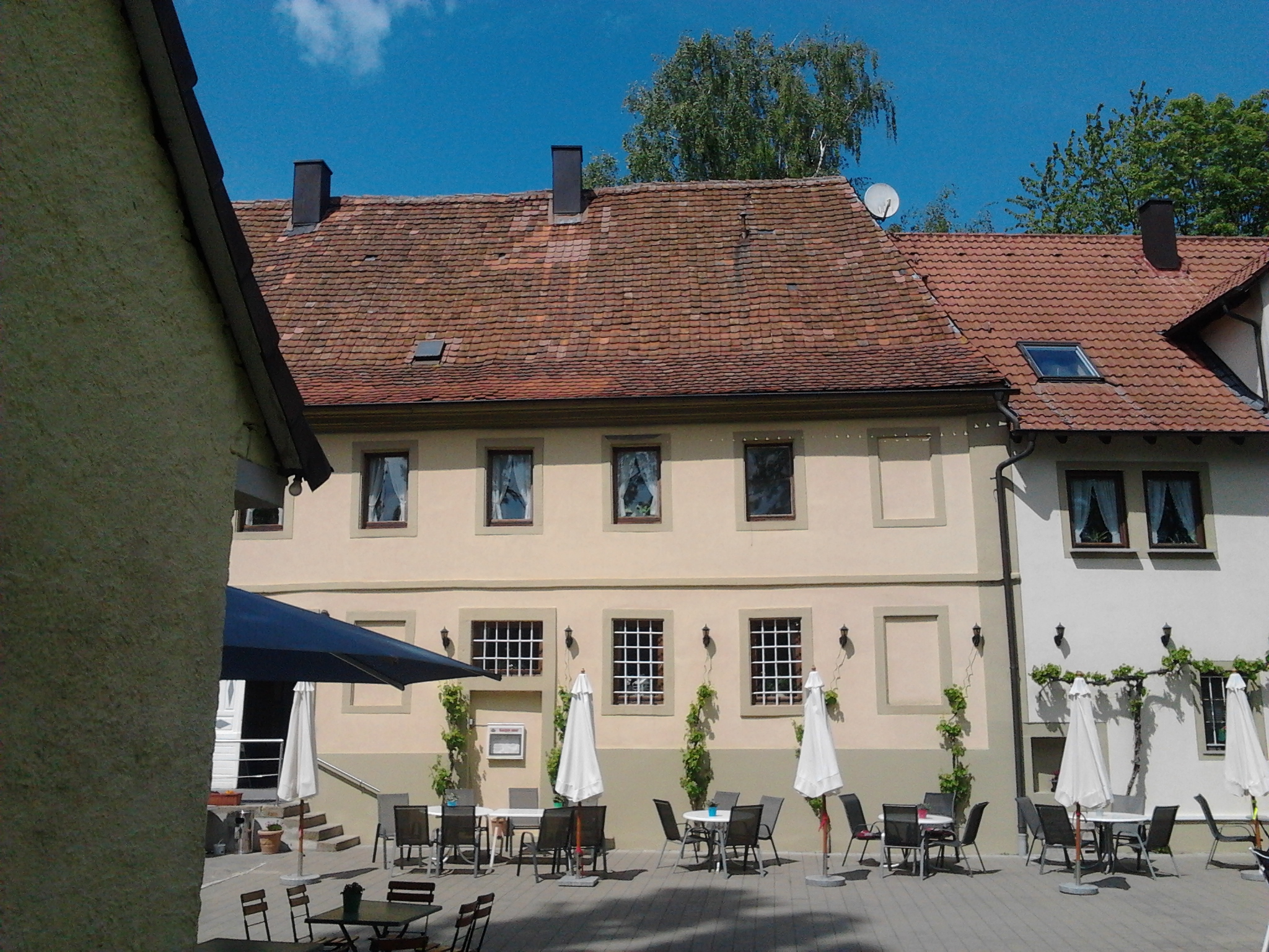 Eingeschossiger Halbwalmdachbau mit geohrten Fensterrahmungen, bezeichnet „1755“